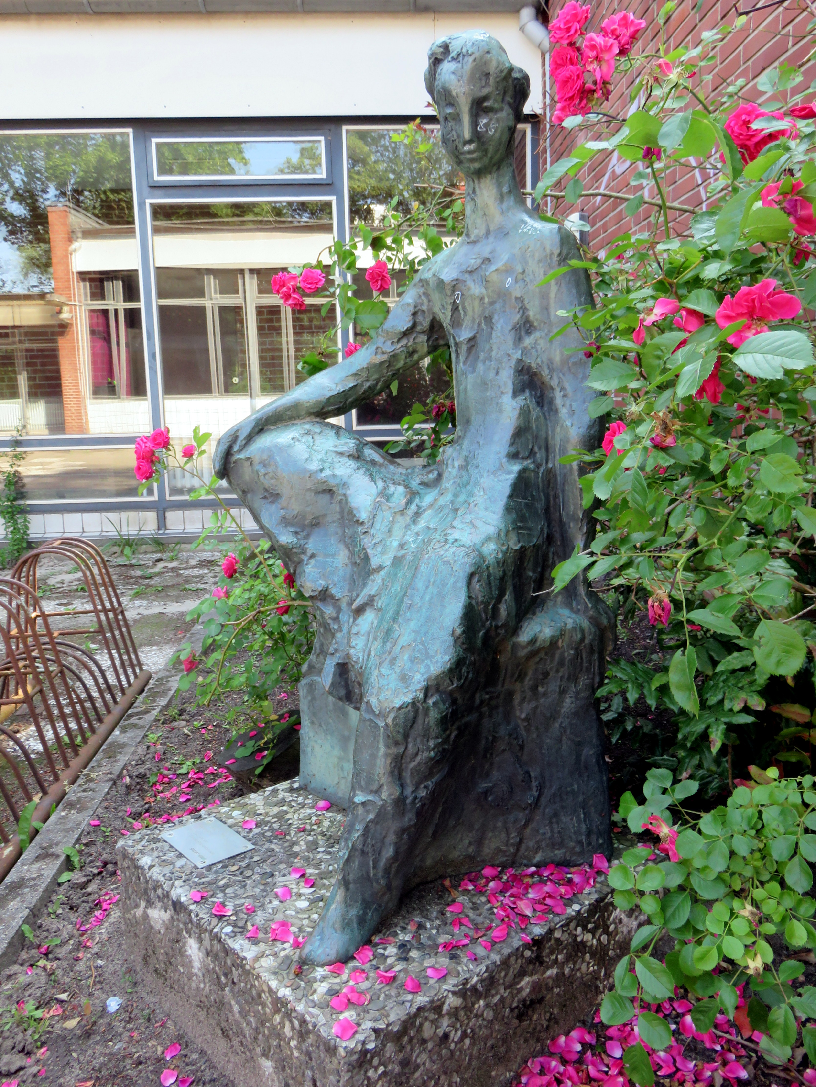 Bronzeplastik „Sitzende Frauen-Figur“ (1968) der deutschen Künstlerin Sabine von Diest-Brackenhausen. Standort: Hamburg-Volksdorf, Ahrensburger Weg 14 (ehemals Haus der Jugend, jetzt Jugendzentrum Manna).